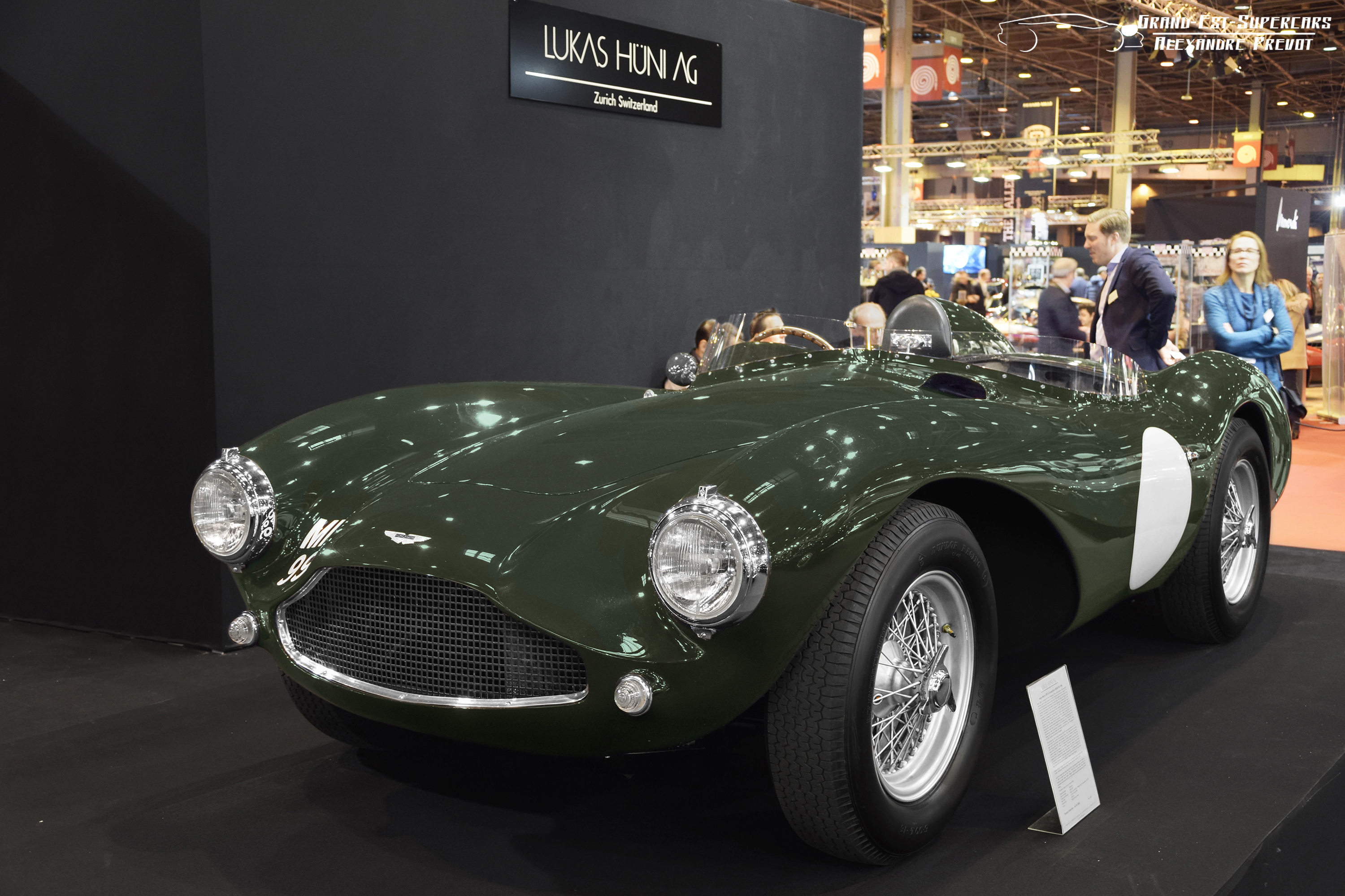 Année du modèle présenté : 1955 Châssis : n°DB3S/108